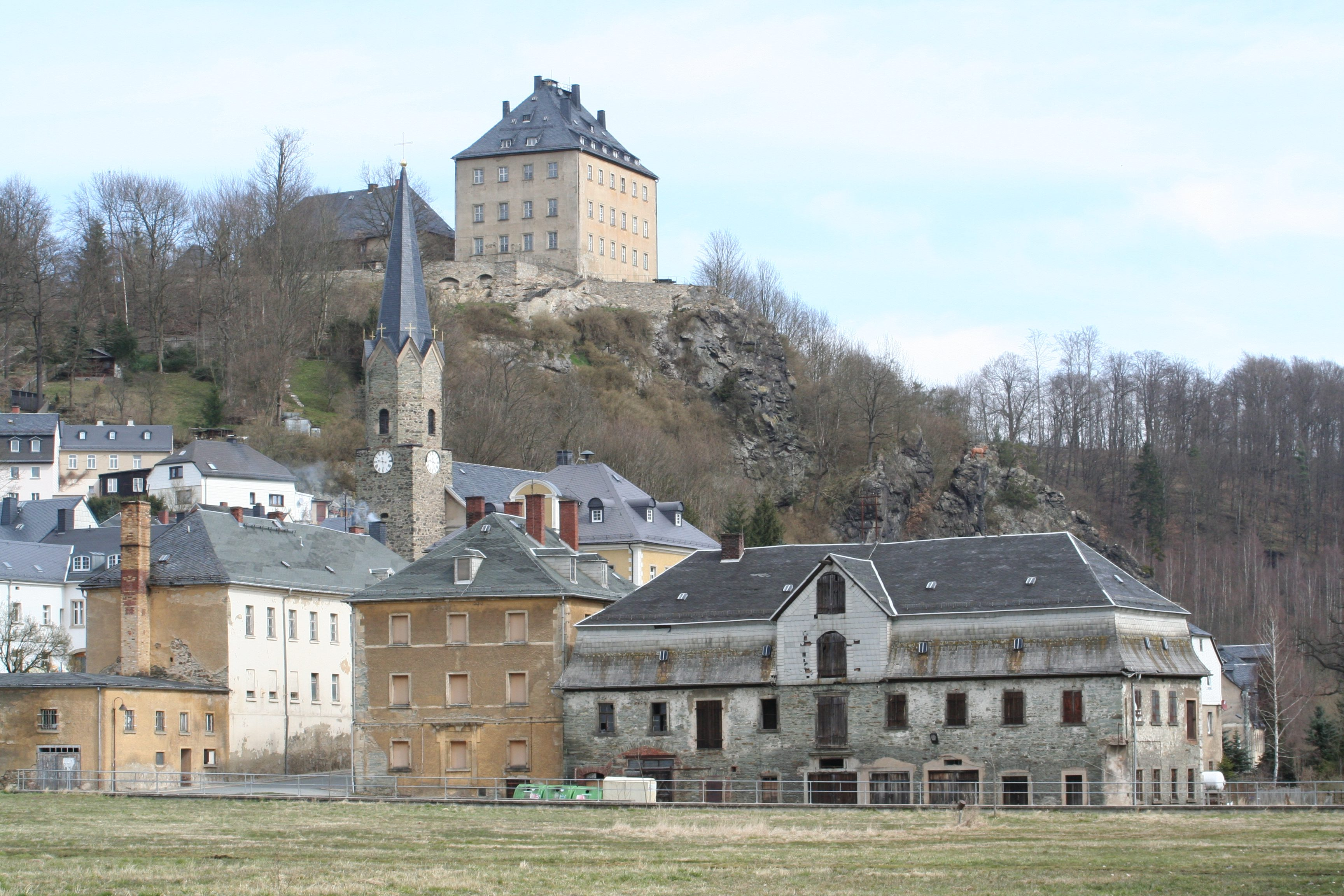 Hirschberg im Saale-Orla-Kreis, Stadtansicht mit Schloss